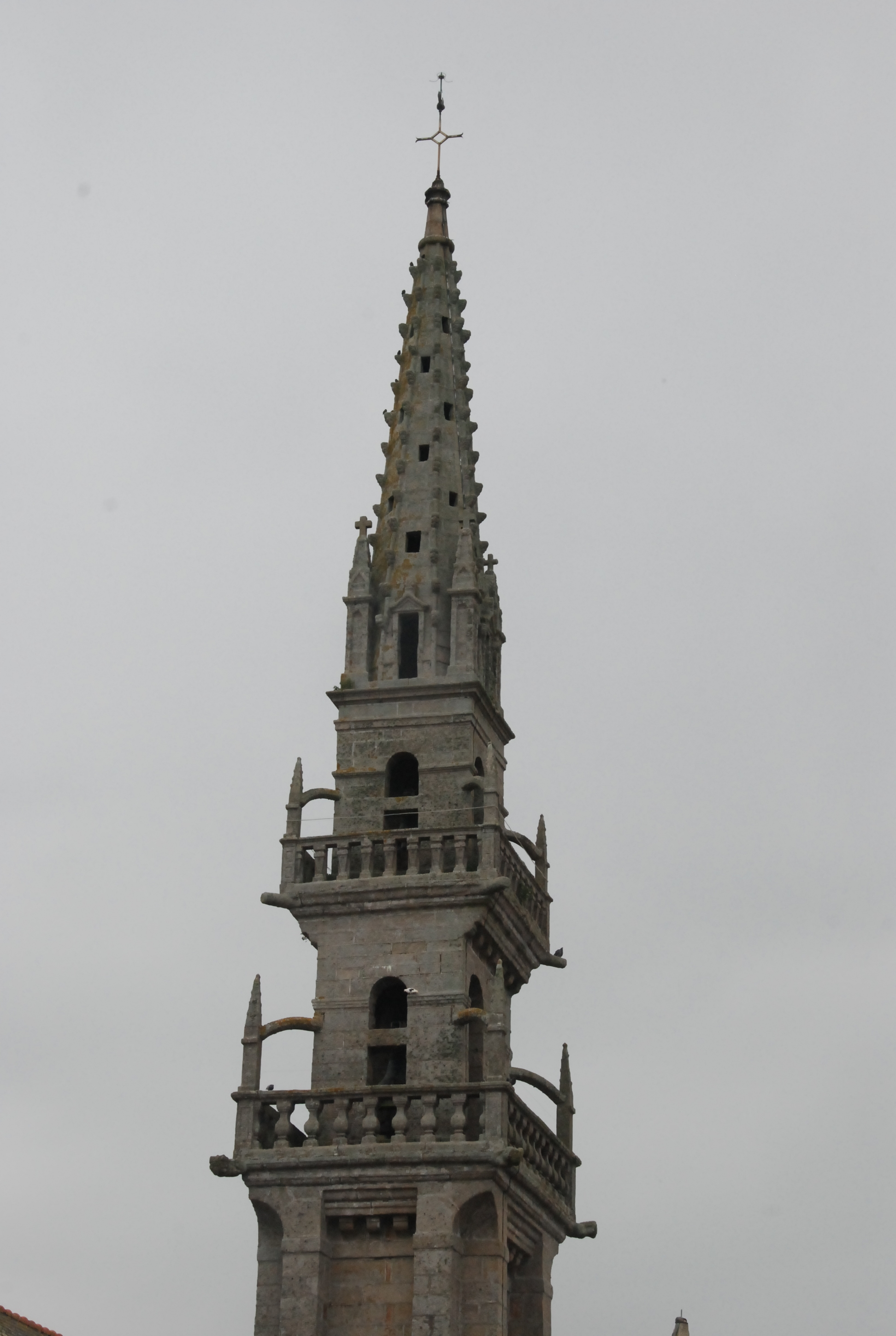 Eglise de Guissény-29